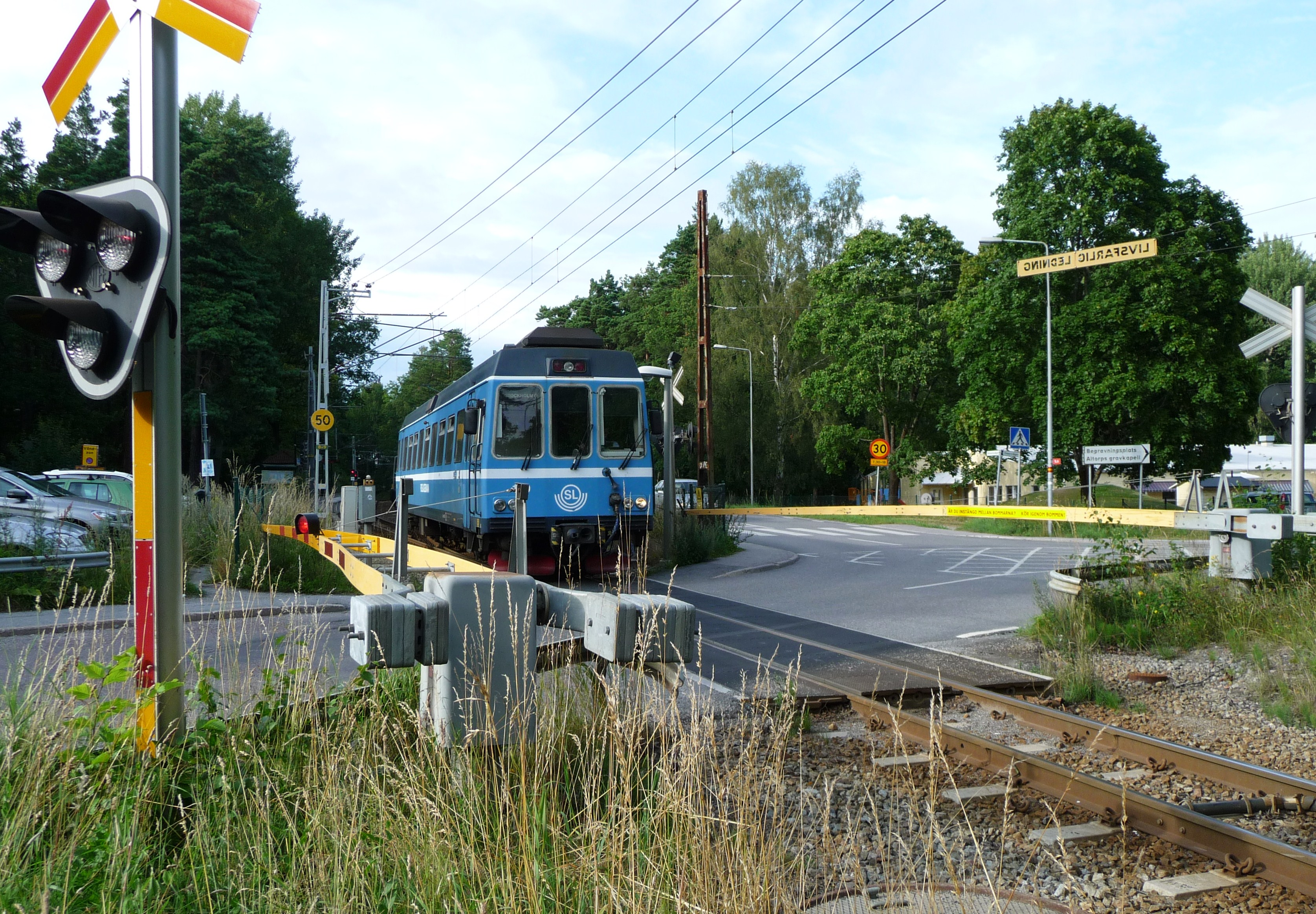 Roslagsbanan övergång Altorp